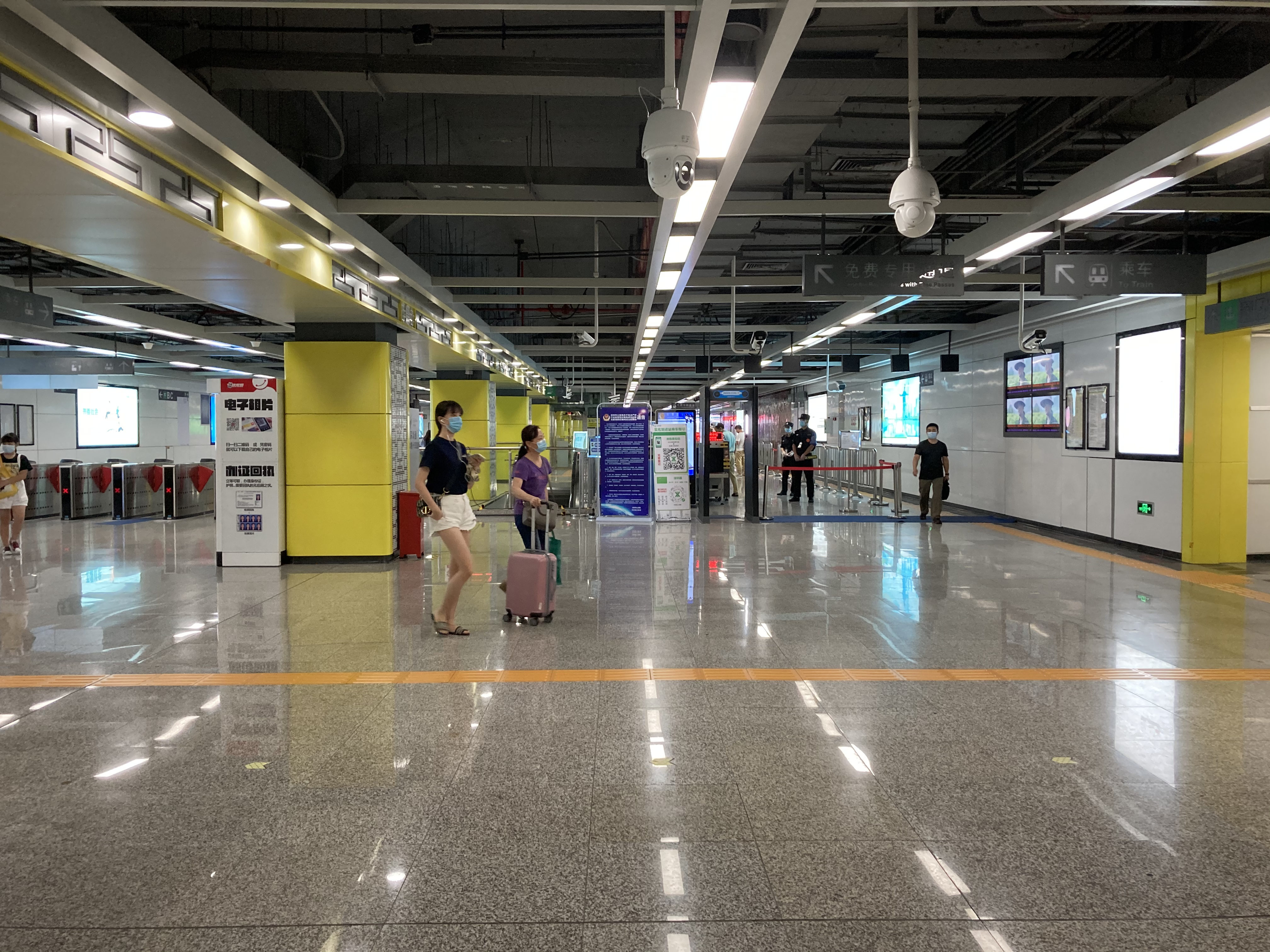 为了与10号线直线通道换乘，收费去从北侧搬到南侧。免费区从南侧搬到北侧。